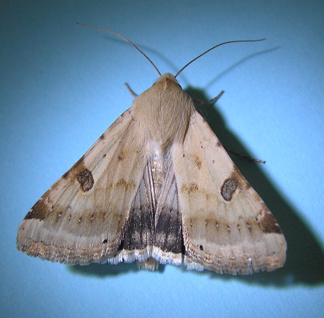 Heliothis peltigera, taken in Jerusalem, Israel